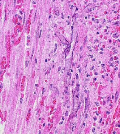 Histologischer Schnitt mit Anfärbung, zeigt P. chrysogenum in darmgewebe mit beginnender Angioinvasion